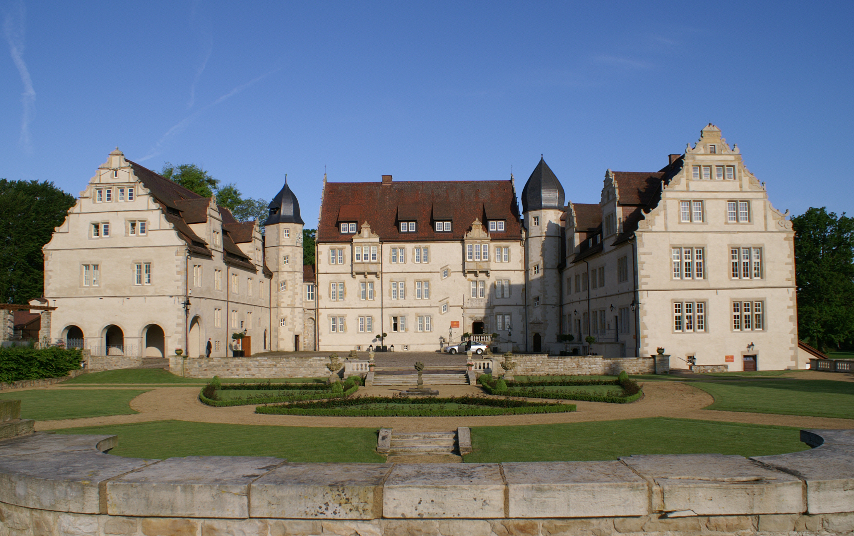 Gartenansicht von Schloss Schwöbber bei Aerzen in der Nähe von Hameln